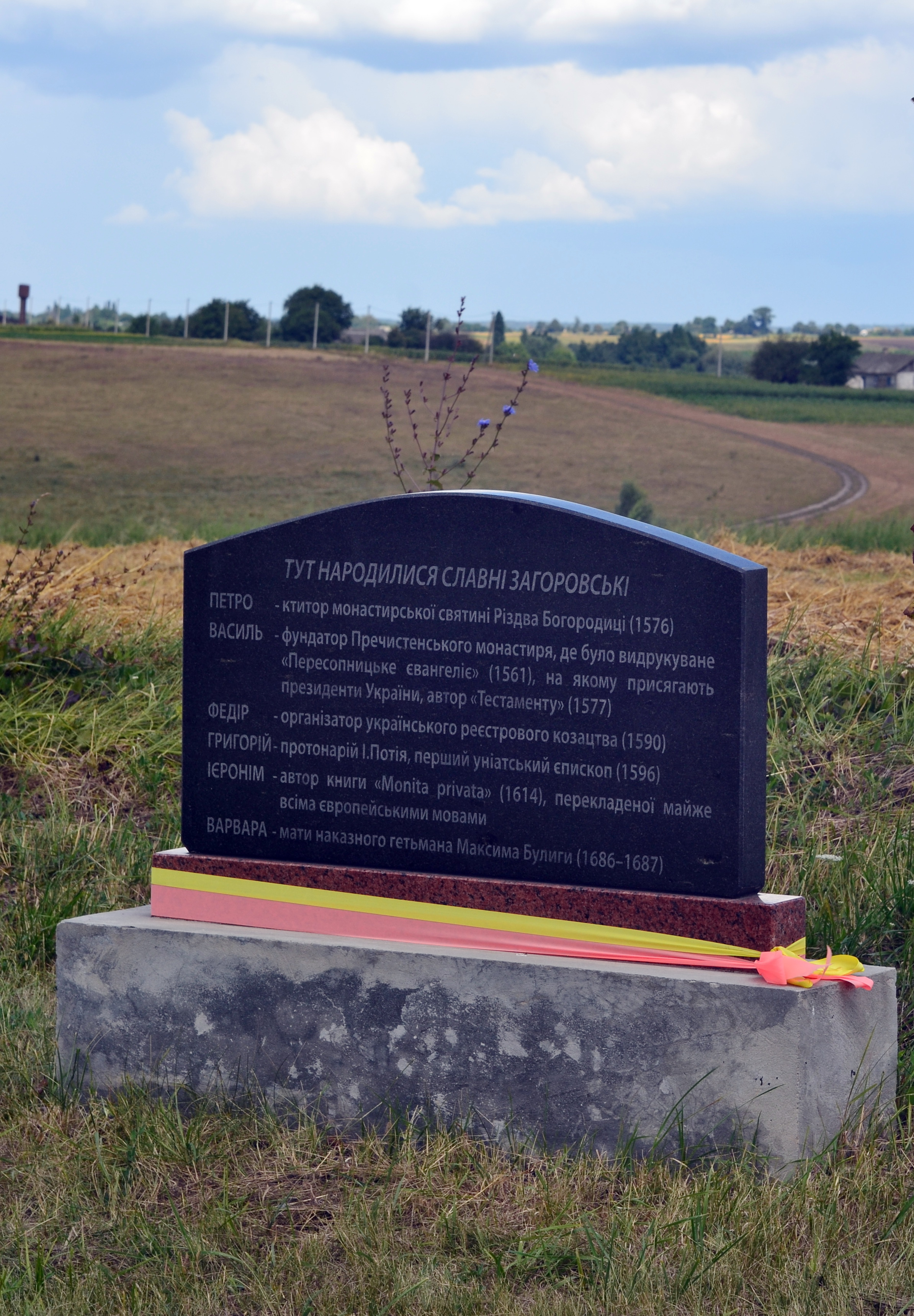 Пам'ятний знак про родину Загоровських, які народилися в селі - Старий Загорів (при в'їзді в село) Локачинський район Волинська область Україна